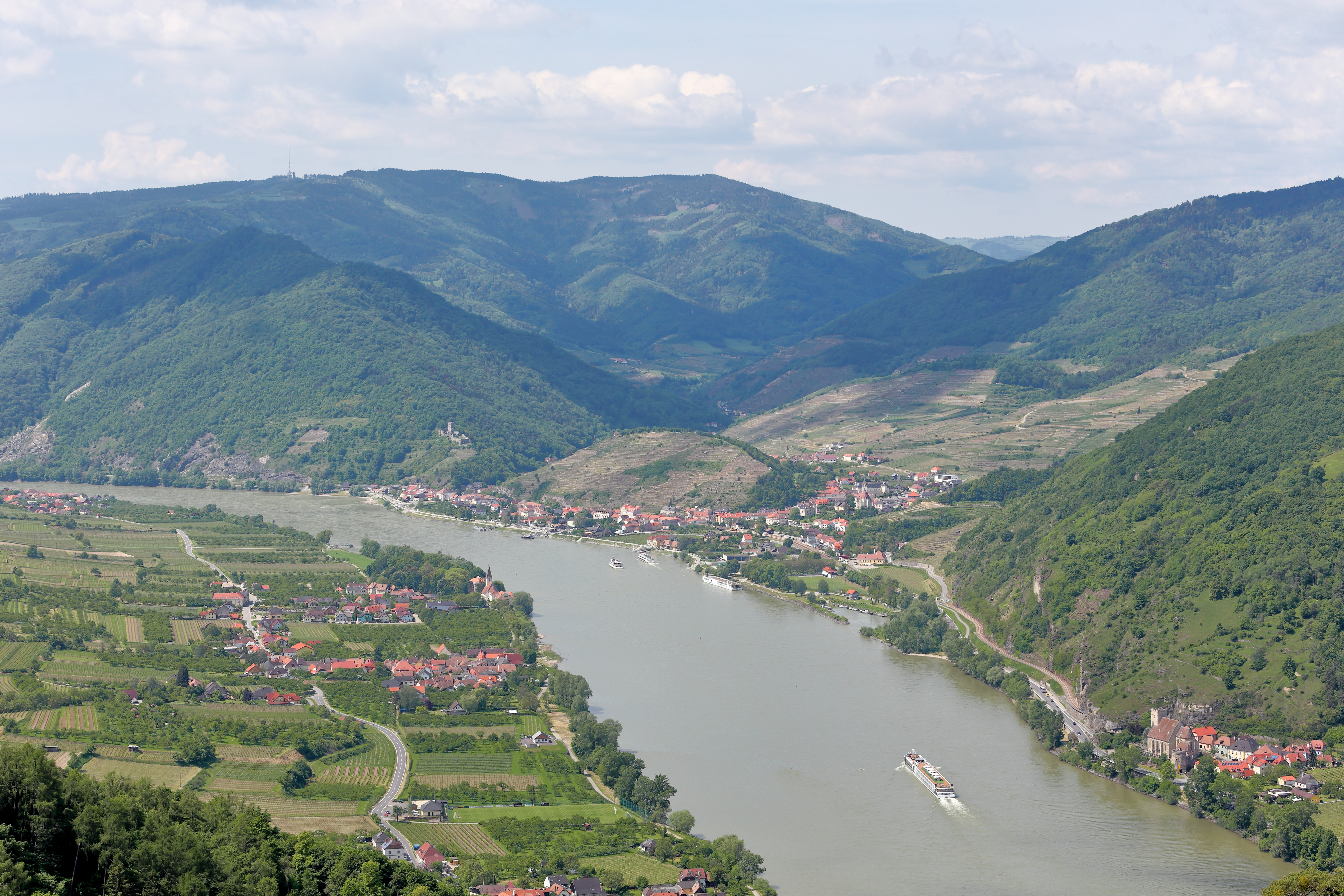 Die Wachau im Bereich Spitz an der Donau bzw. Blick von einem Vorgipfel des 671 Meter hohen Seekopfes, Richtung Westen.Links von vorne nach hinten die Ortschaften Bach-, Mitter-, Hof- und Oberarnsdorf, die alle zur Marktgemeinde Rossatz-Arnsdorf gehören. Rechts im Vordergrund die Ortschaft St. Michael (Marktgemeinde Weißenkirchen in der Wachau) mit der Wehrkirche St. Michael bzw. "Mutterkirche der Wachau" und dahinter Spitz an der Donau.